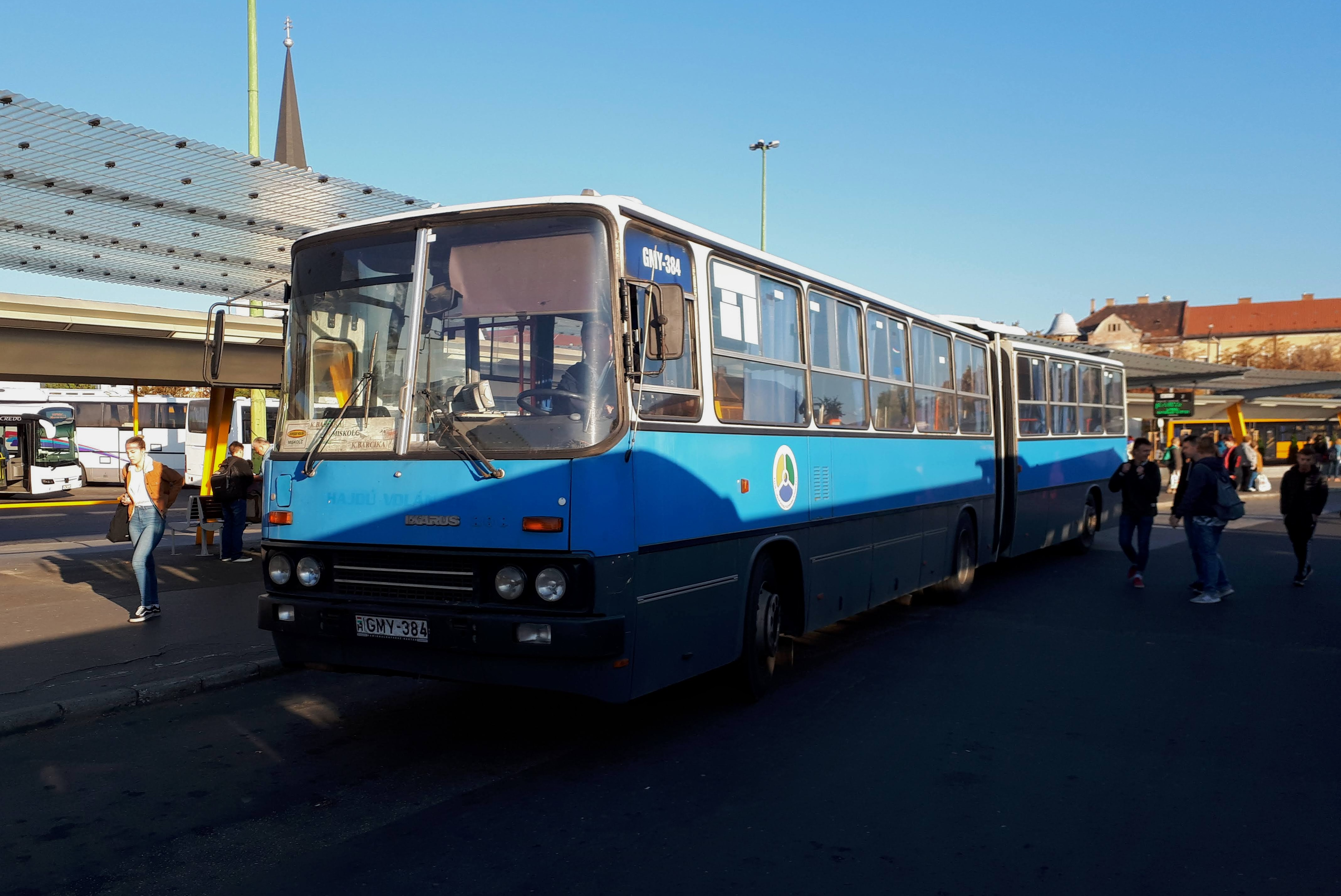 Az ÉMKK GMY-384 rendszámú Ikarus 280 típusú busza Miskolcon, a 3765-ös helyközi járaton.